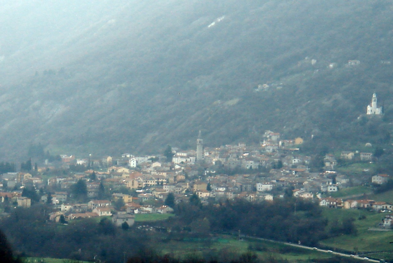 Veduta di Revine dal santuario di Santa Augusta